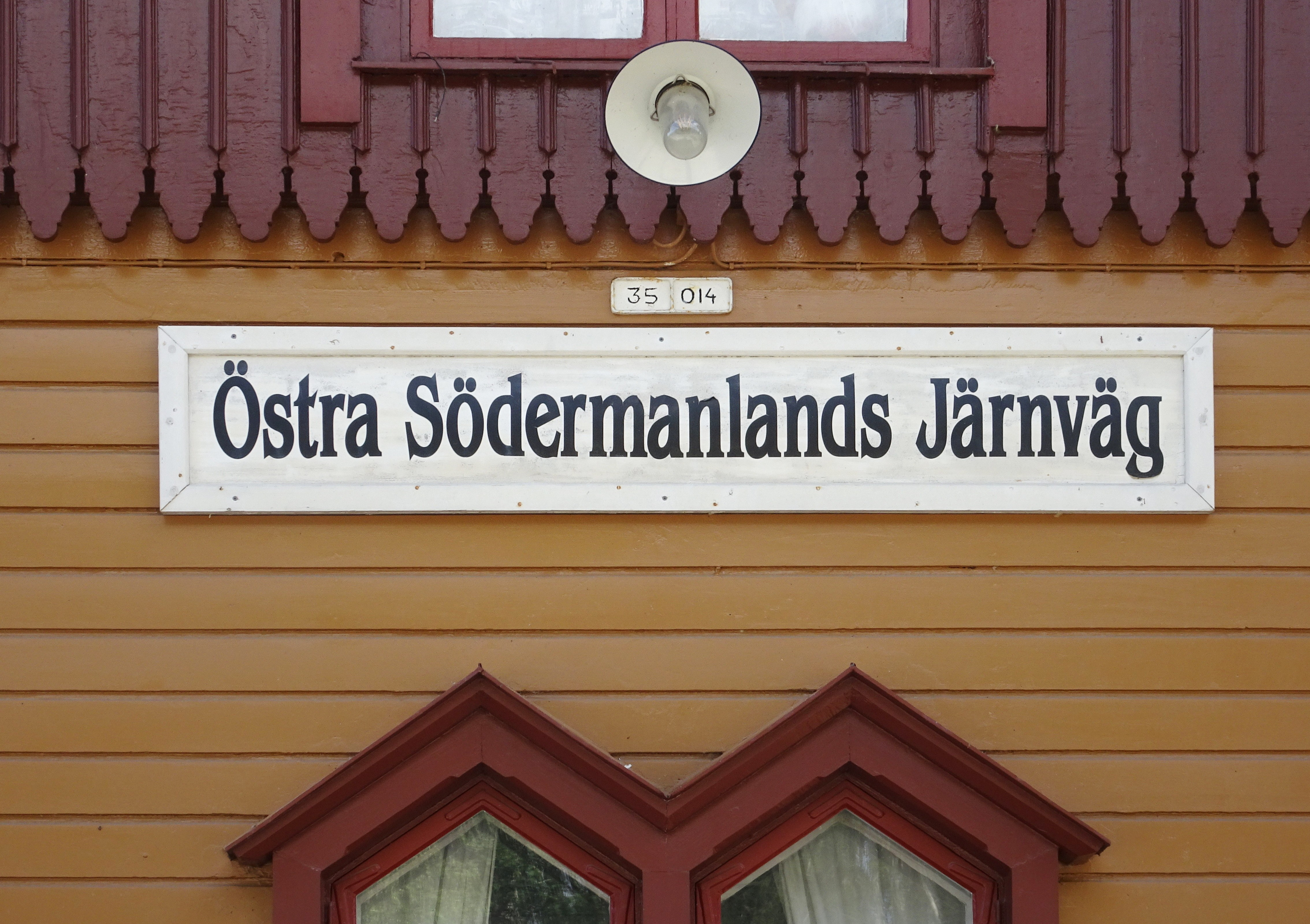 Läggesta Nedre station